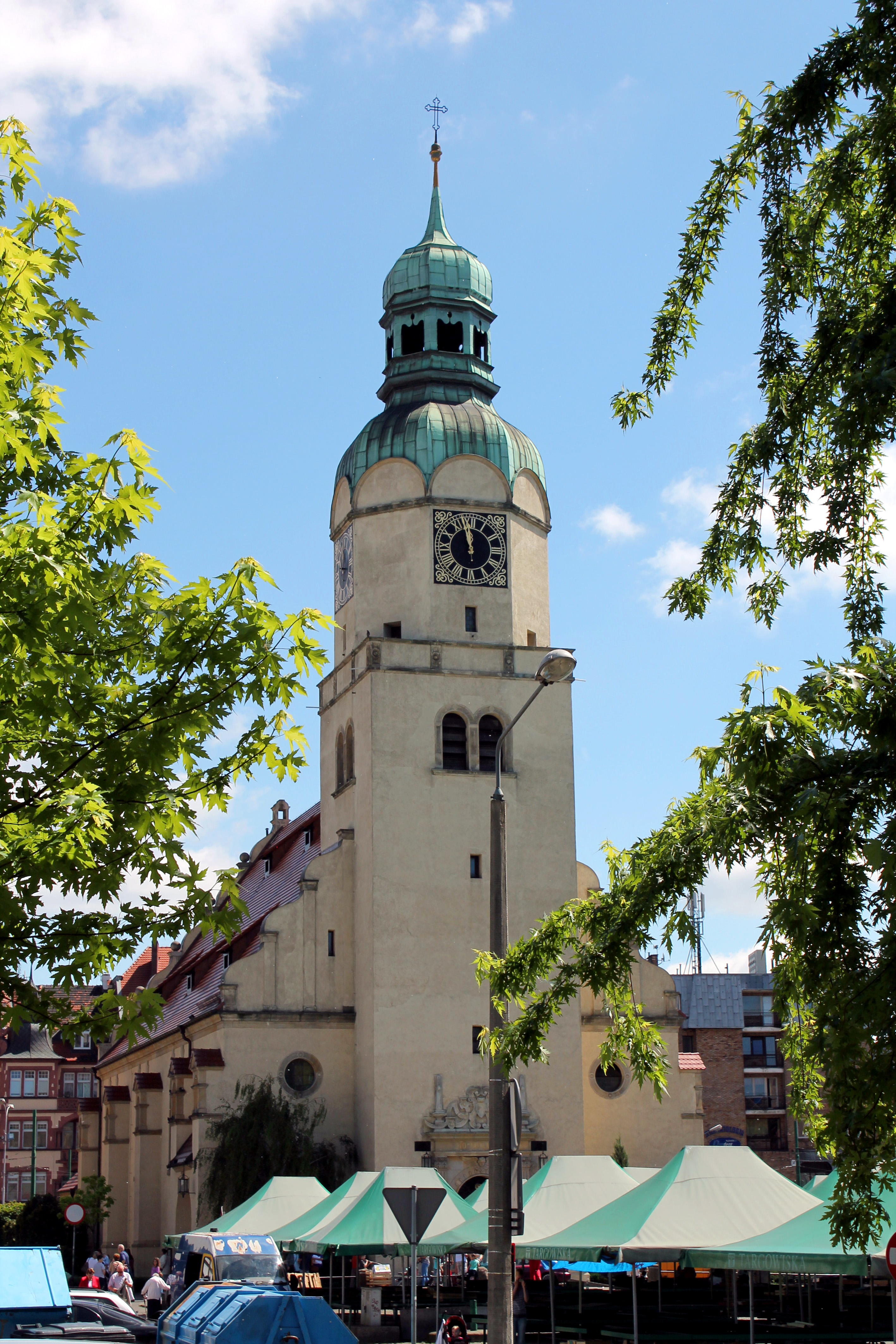 Kościół Maryi Królowej na Wildzie w Poznaniu.